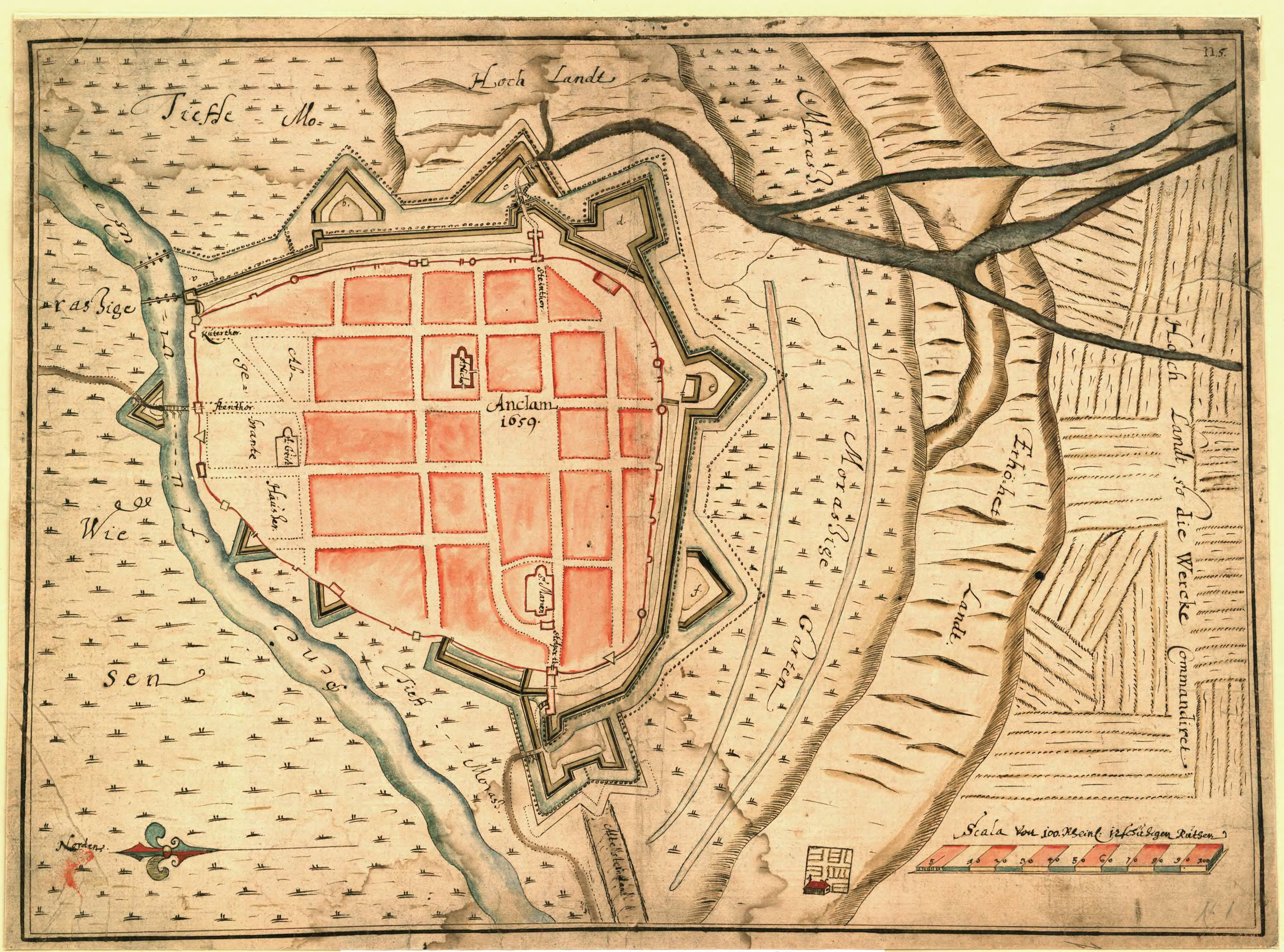 Map of Anklam